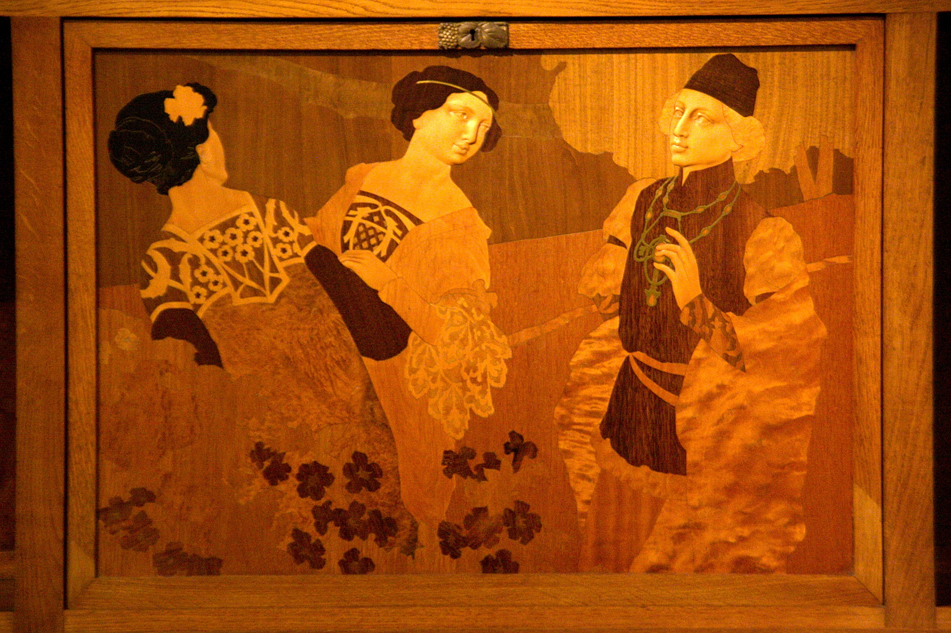 Palau Nacional (Barcelona). Detall del mobiliari de la casa Lleó Morera dissenyada per Gaspar Homar